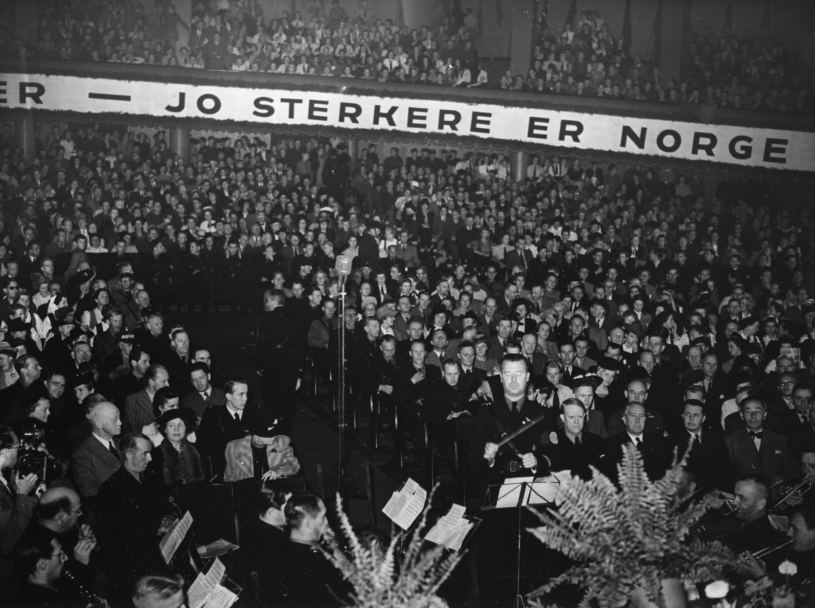 1941/09/05. RA/RAFA-3309/U 38A/5/38-5-4 img125